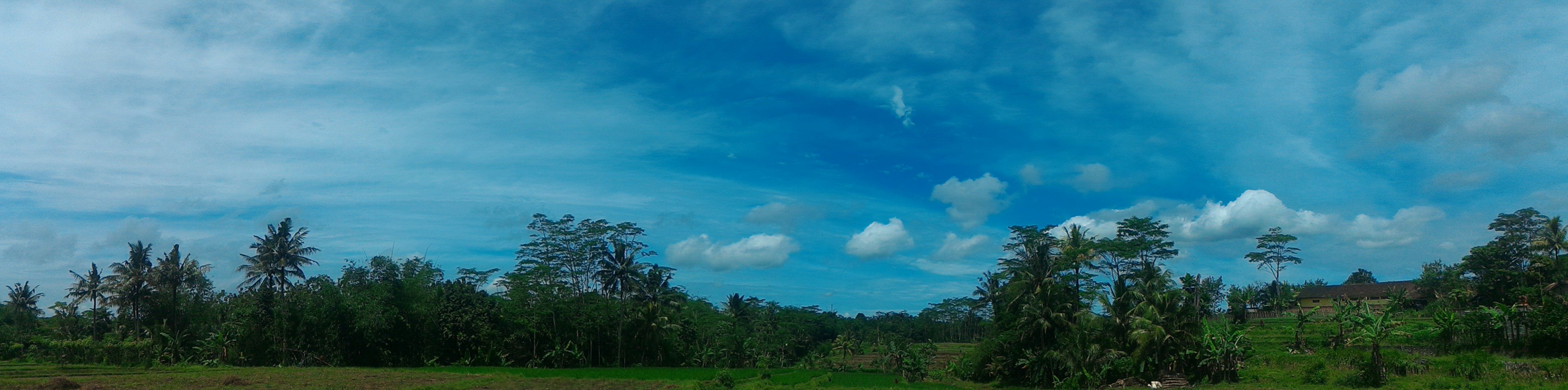 Basa Sunda: Panénjoan langit ti Tapos, Bojonggenteng, Sukabumi